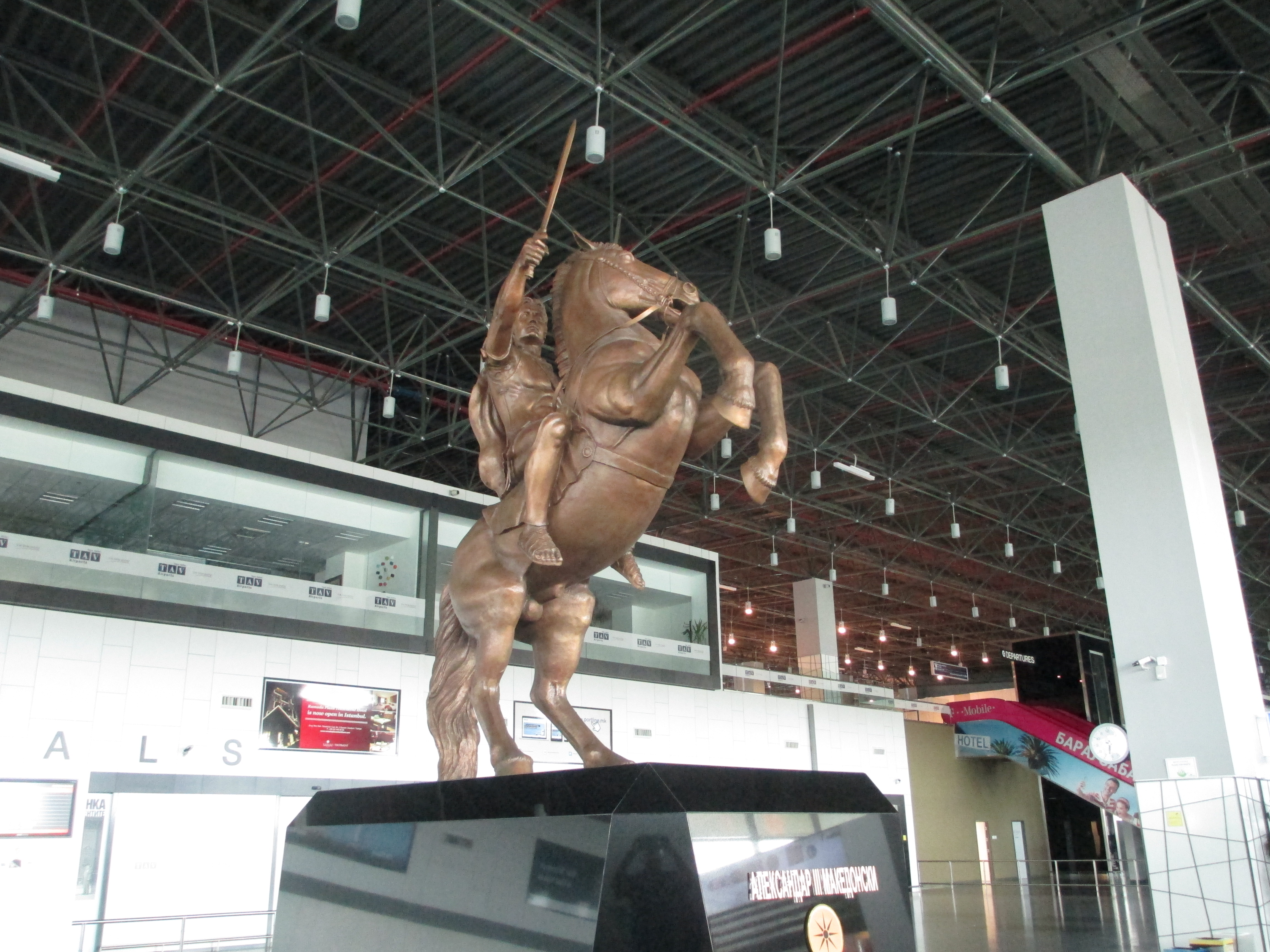 פסל אלכסנדר מוקדון בשדה התעופה אלכסנדר הגדול בסקופיה